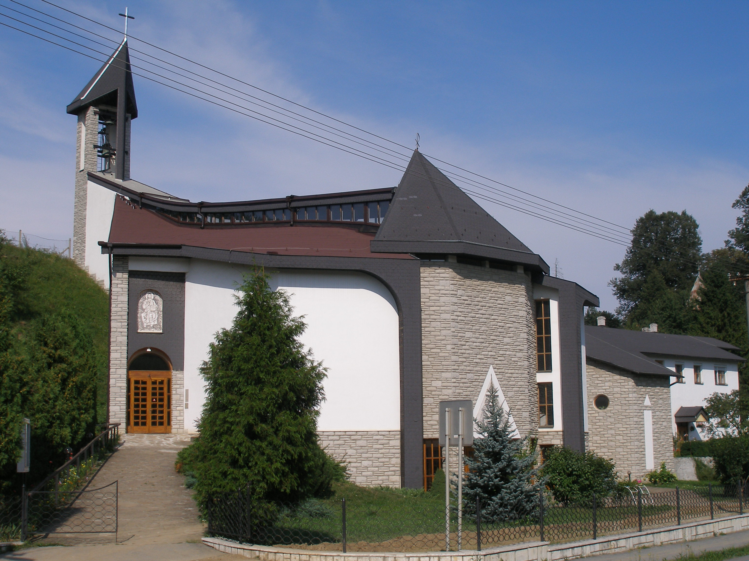 Obec Fričovce okr.Prešov, región Šariš